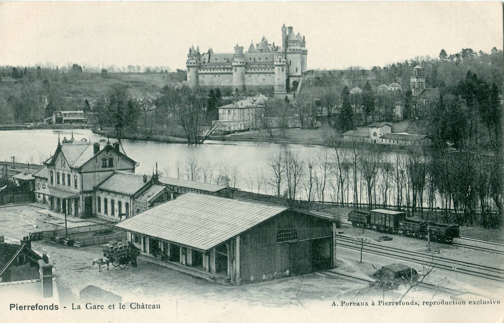 Carte postale ancienne éditée par poreaux Pierrefonds (Oise) : La Gare et le Château